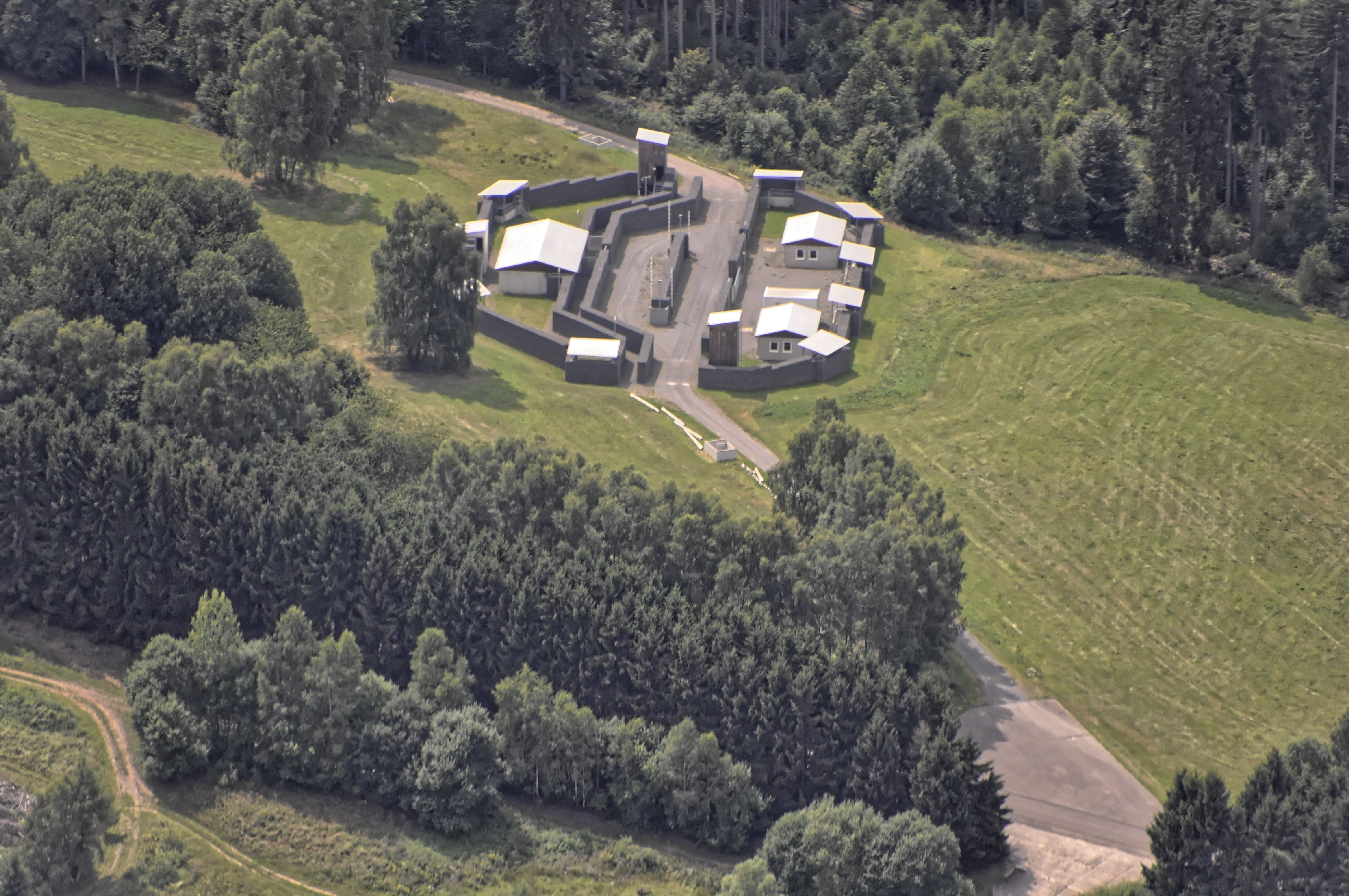 Bilder vom Flug Nordholz-Hammelburg 2015: "Grenzübergang"-Übungsgelände auf dem ehem. Truppenübungsplatz, heute Standortübungsplatz Schwarzenborn.